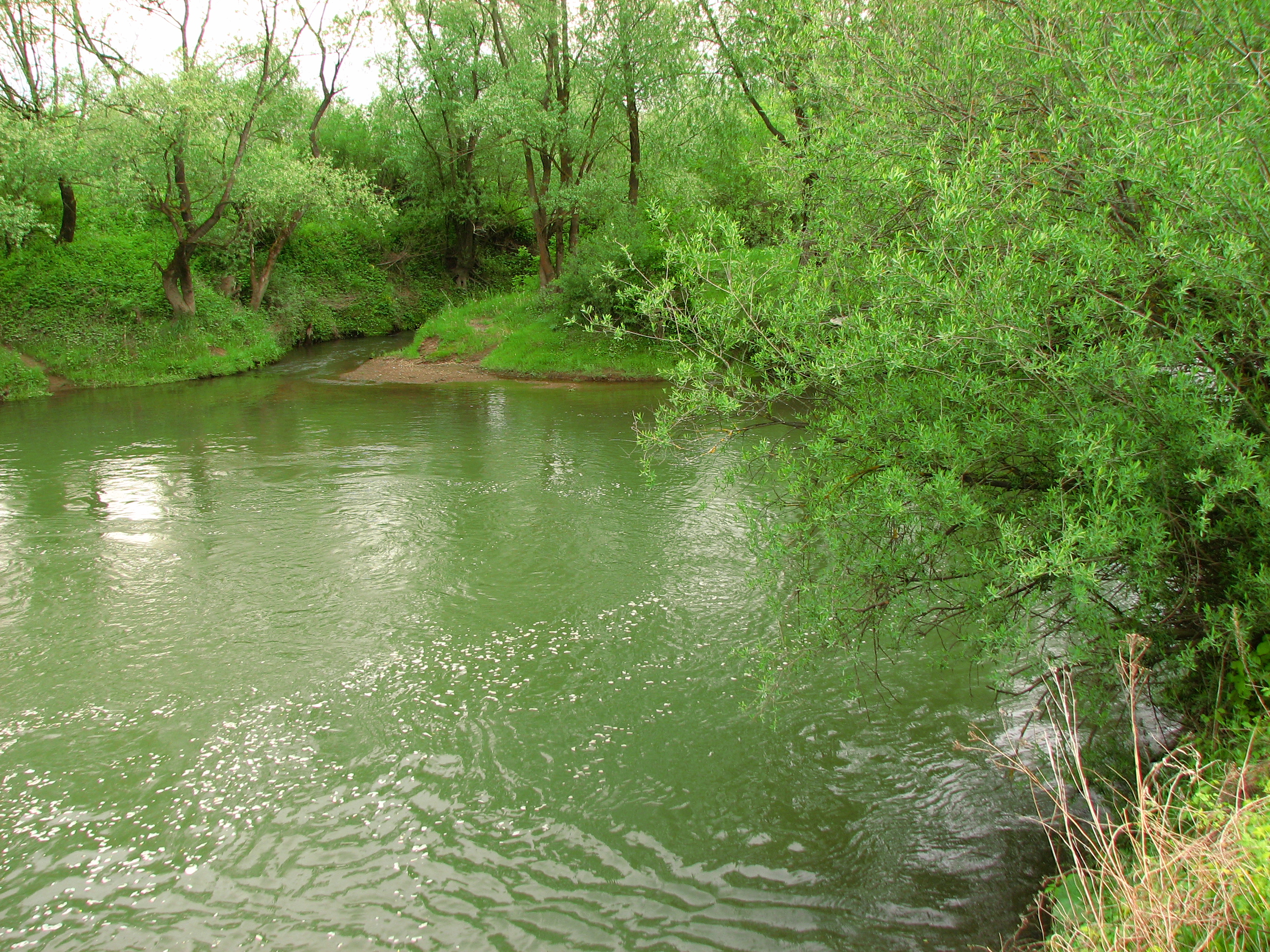 р. Бистриця.